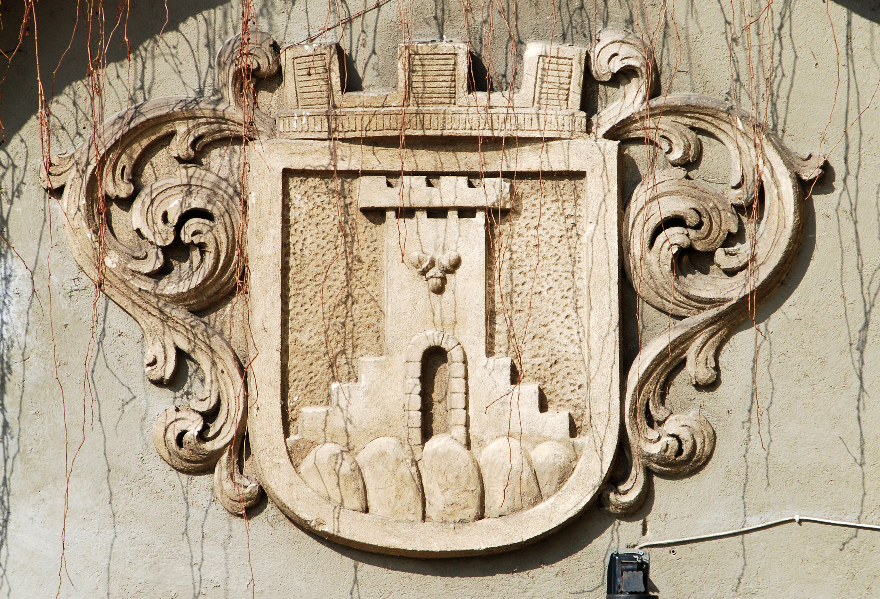 Otmuchów, zamek, ob. hotel, 1295, 1484-85, kon. XVI, 1828